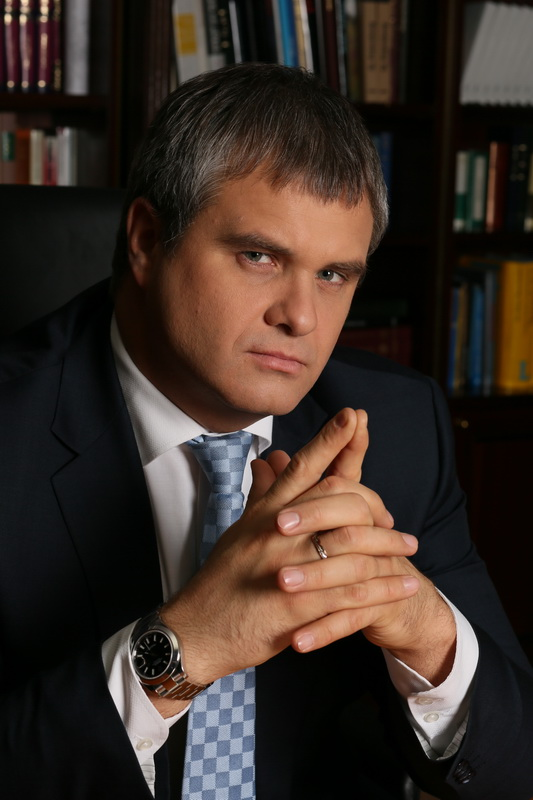 Роман Путин